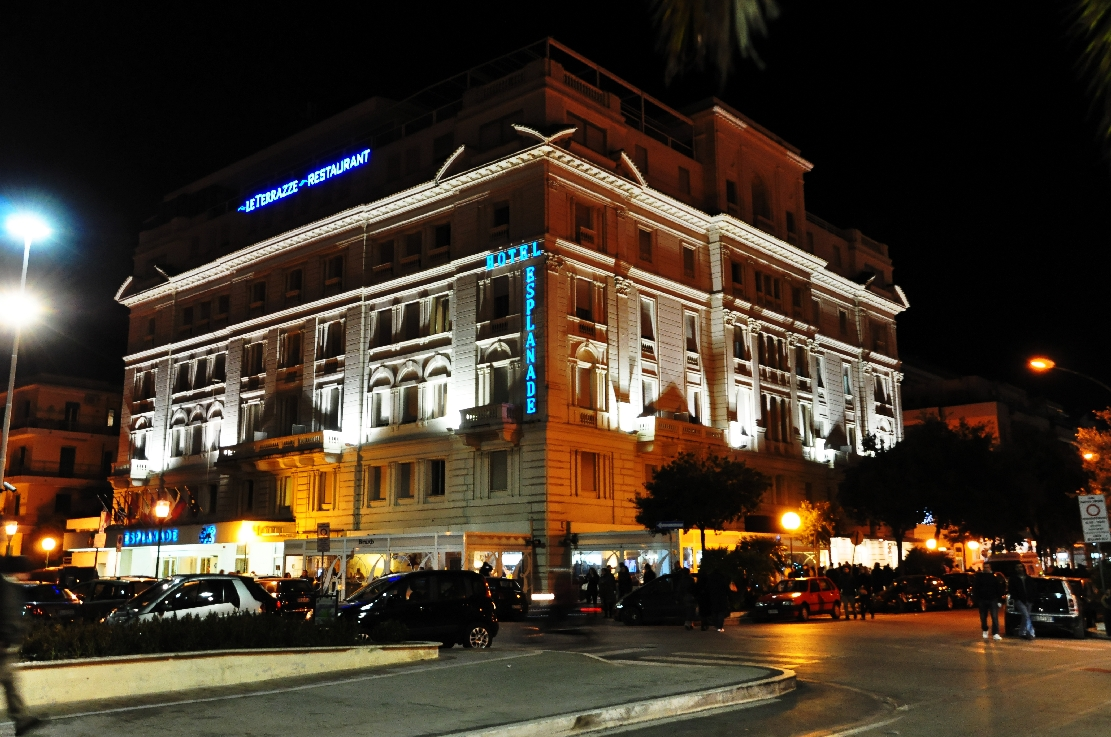 Pescara Centro